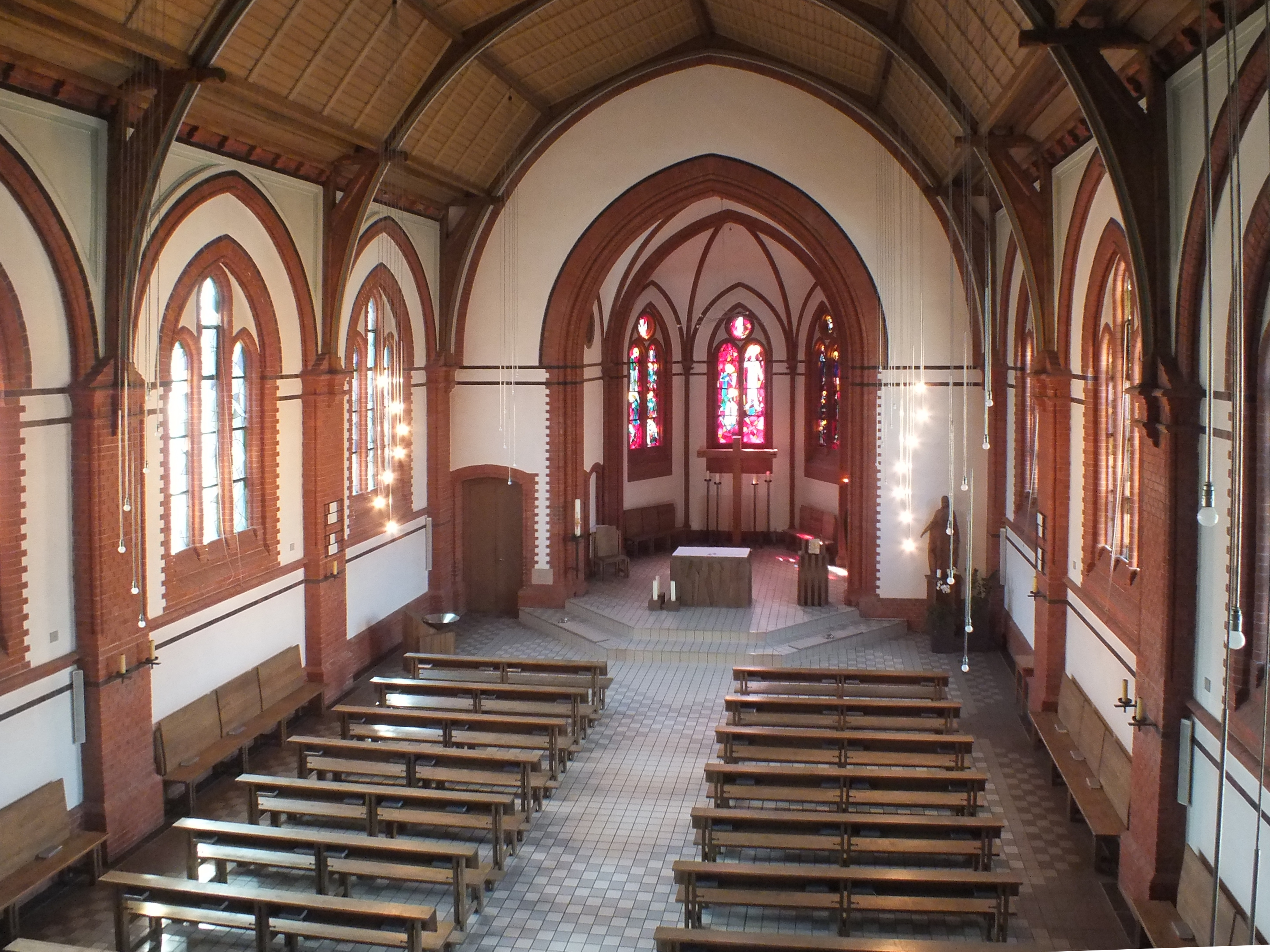 Berlin-Köpenick, Lindenstraße: Kathol. Kirche St. Josef; Blick in das Kirchenschiff von der Orgelempore aus